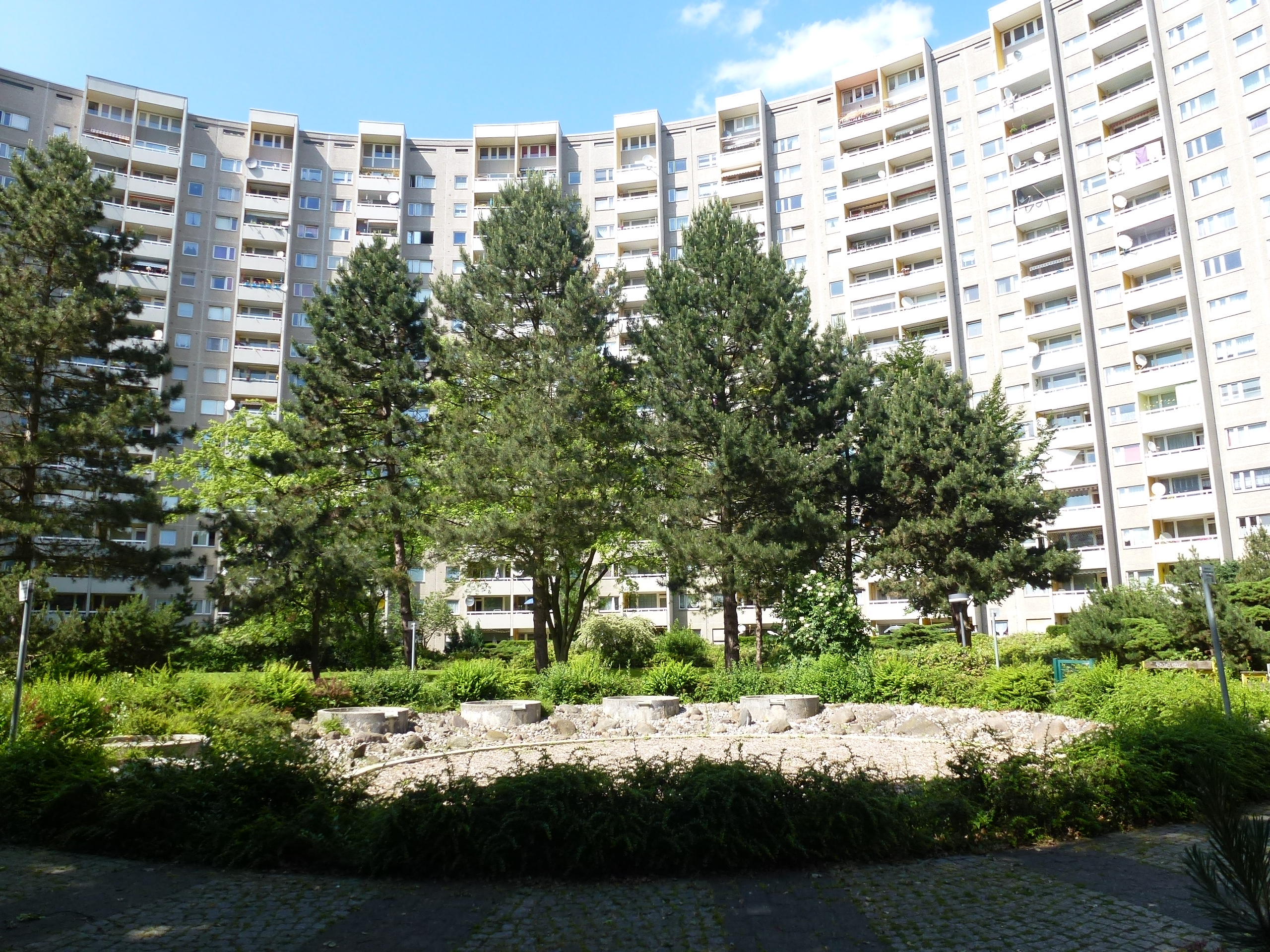 Berlin-Gropiusstadt Wildmeisterdamm Gropiushaus